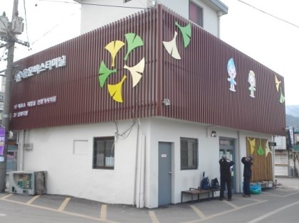 용문버스터미널(최근)